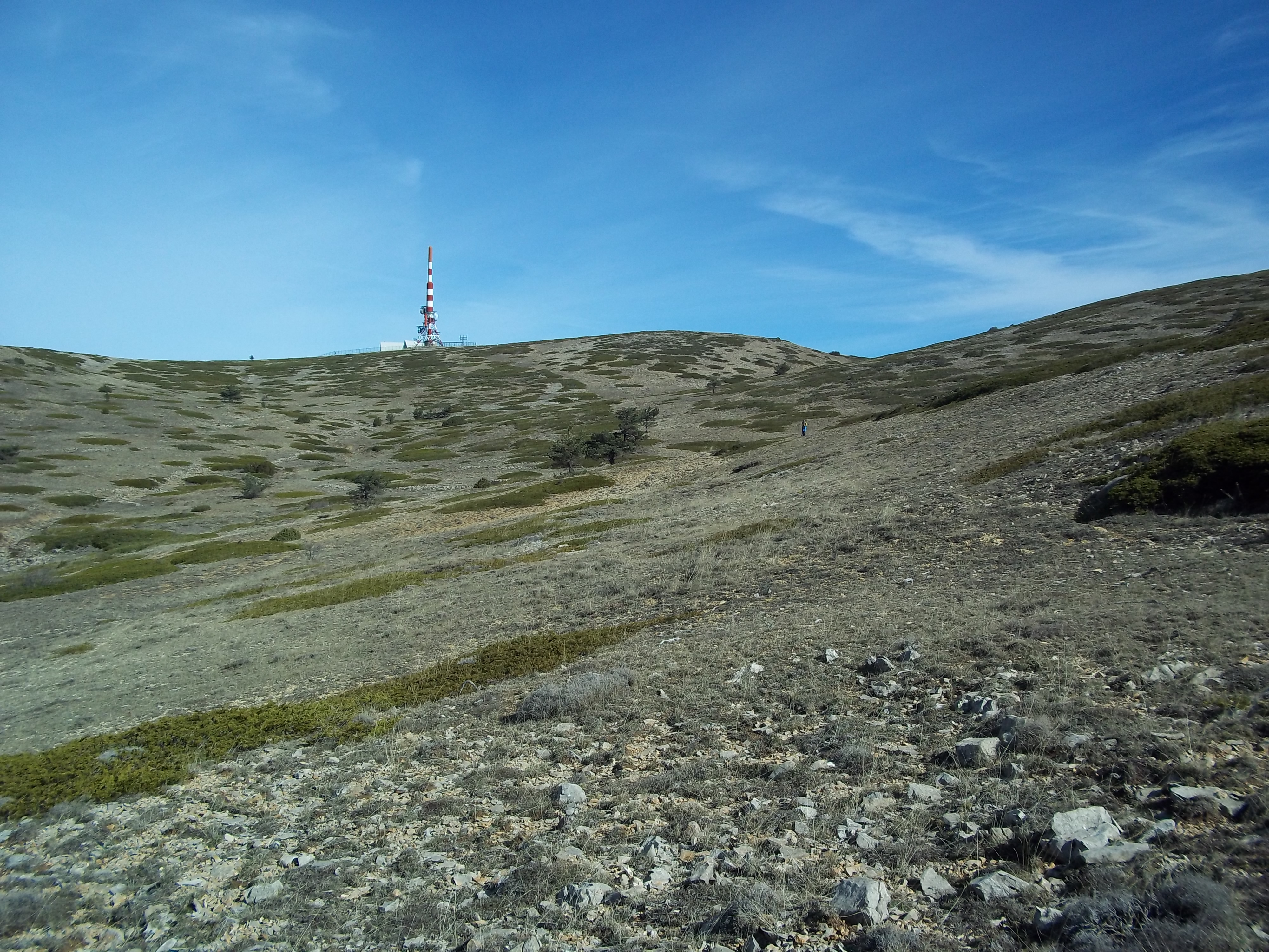 Vista del cim del Javalambre des de l'oest, amb l'antena que hi ha a prop del cim.